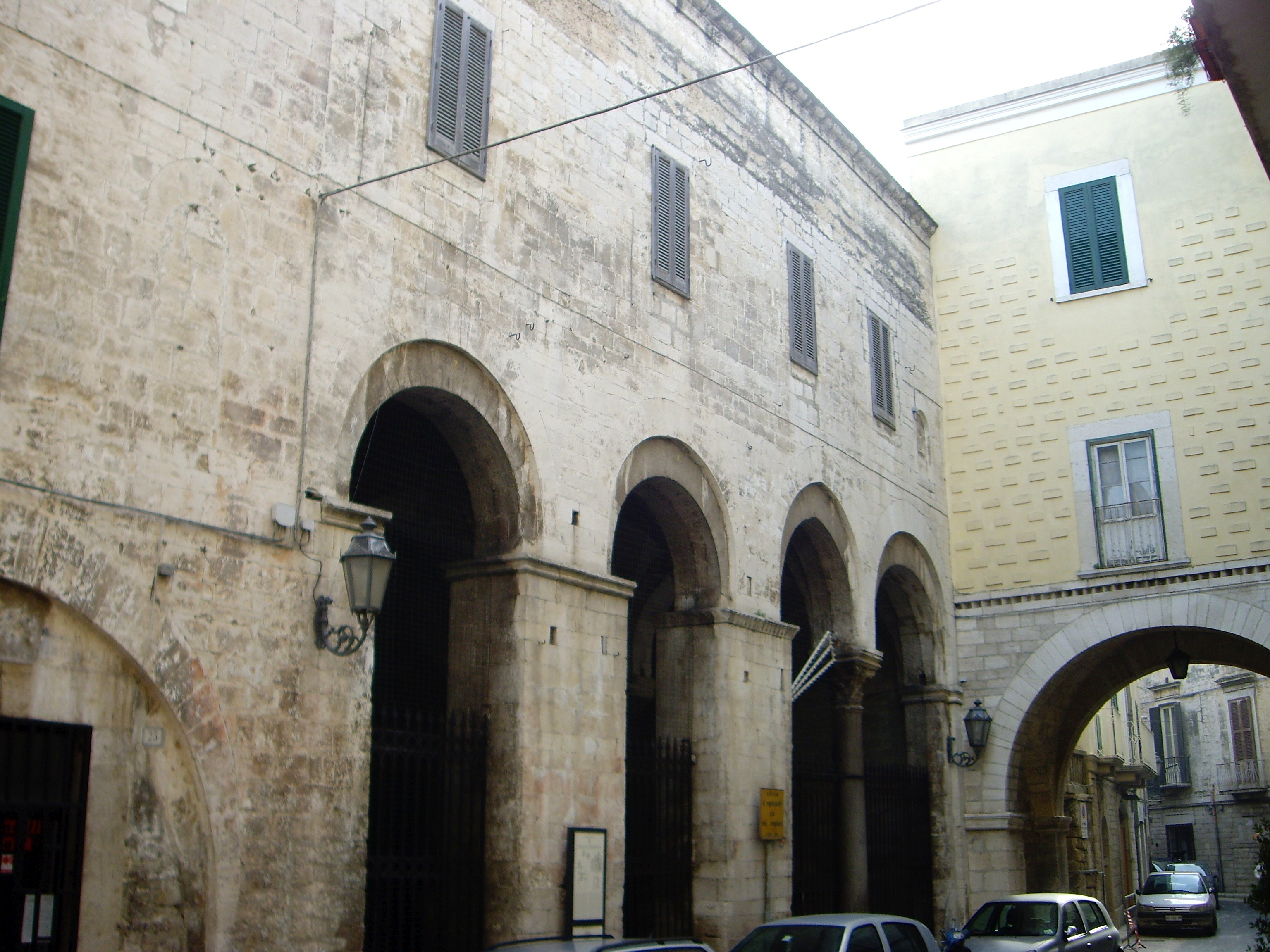 Church of Ognissanti in Trani